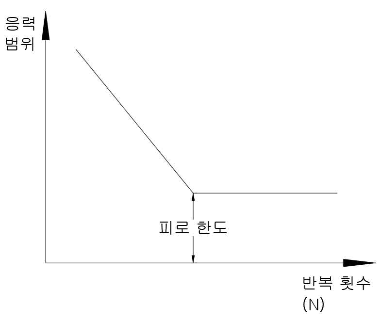 피로 현상 S-N 곡선